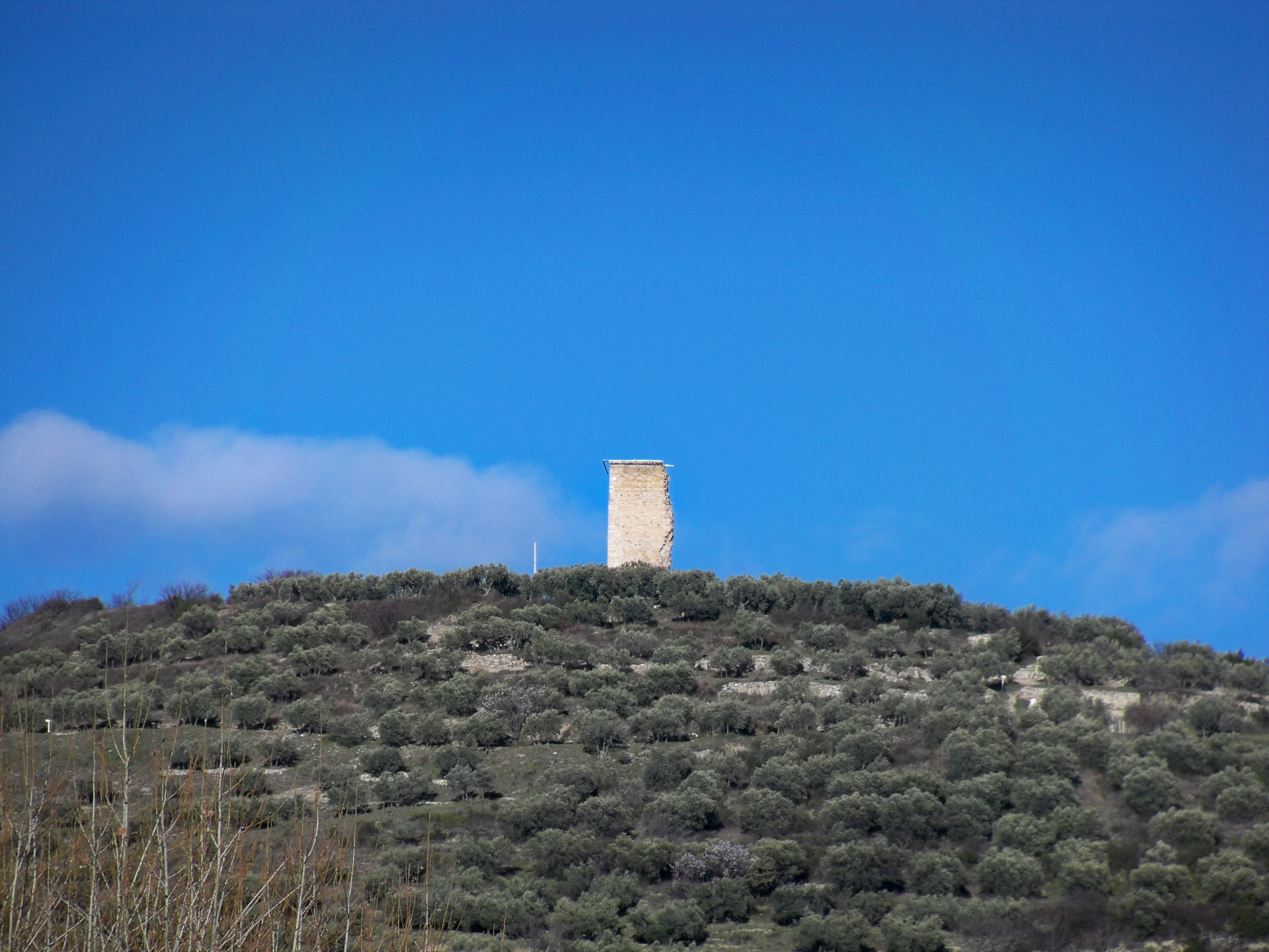 Tour Mont d'Or à Manosque, France